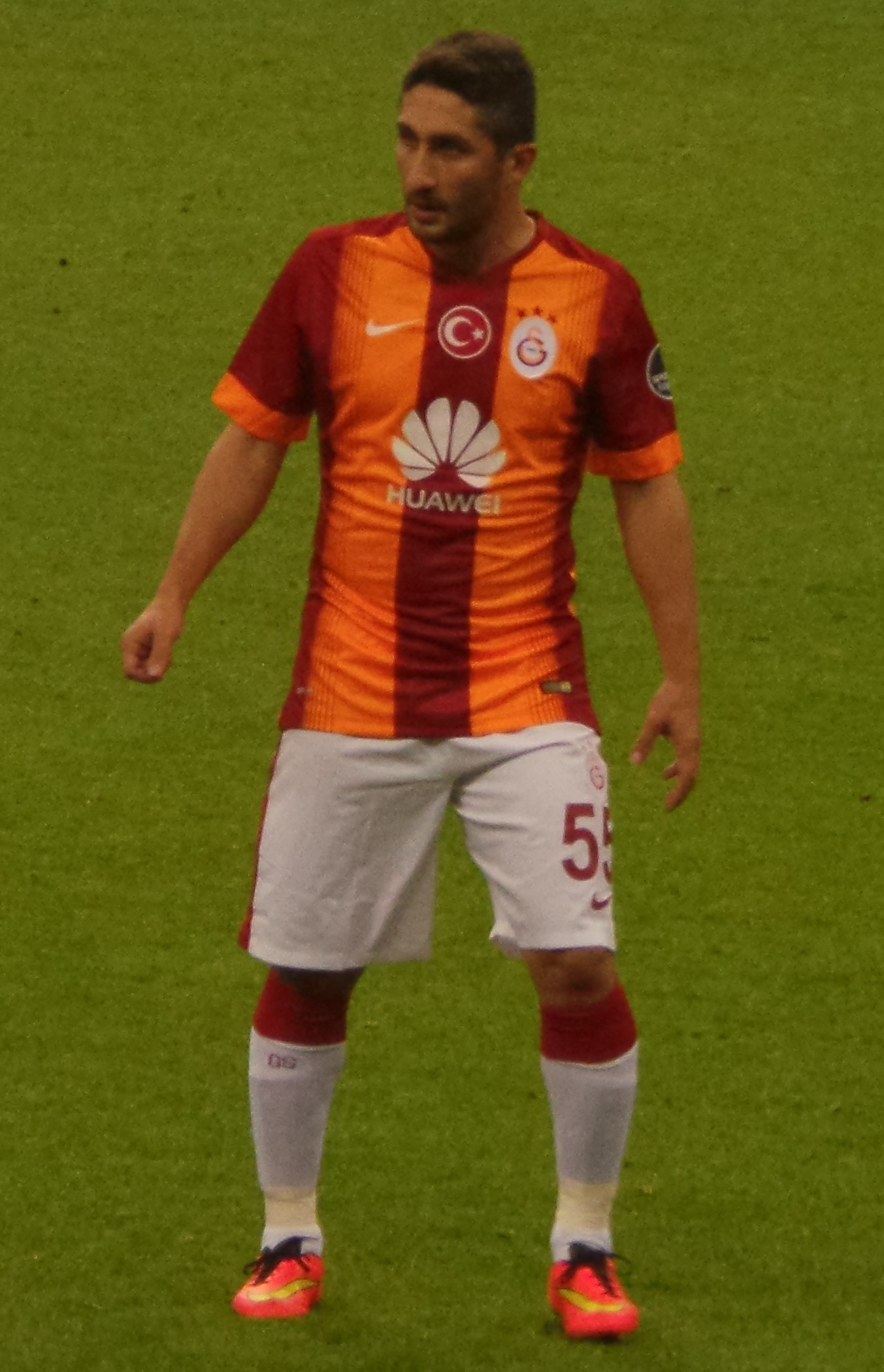 Sabri Sarıoğlu 2014-15